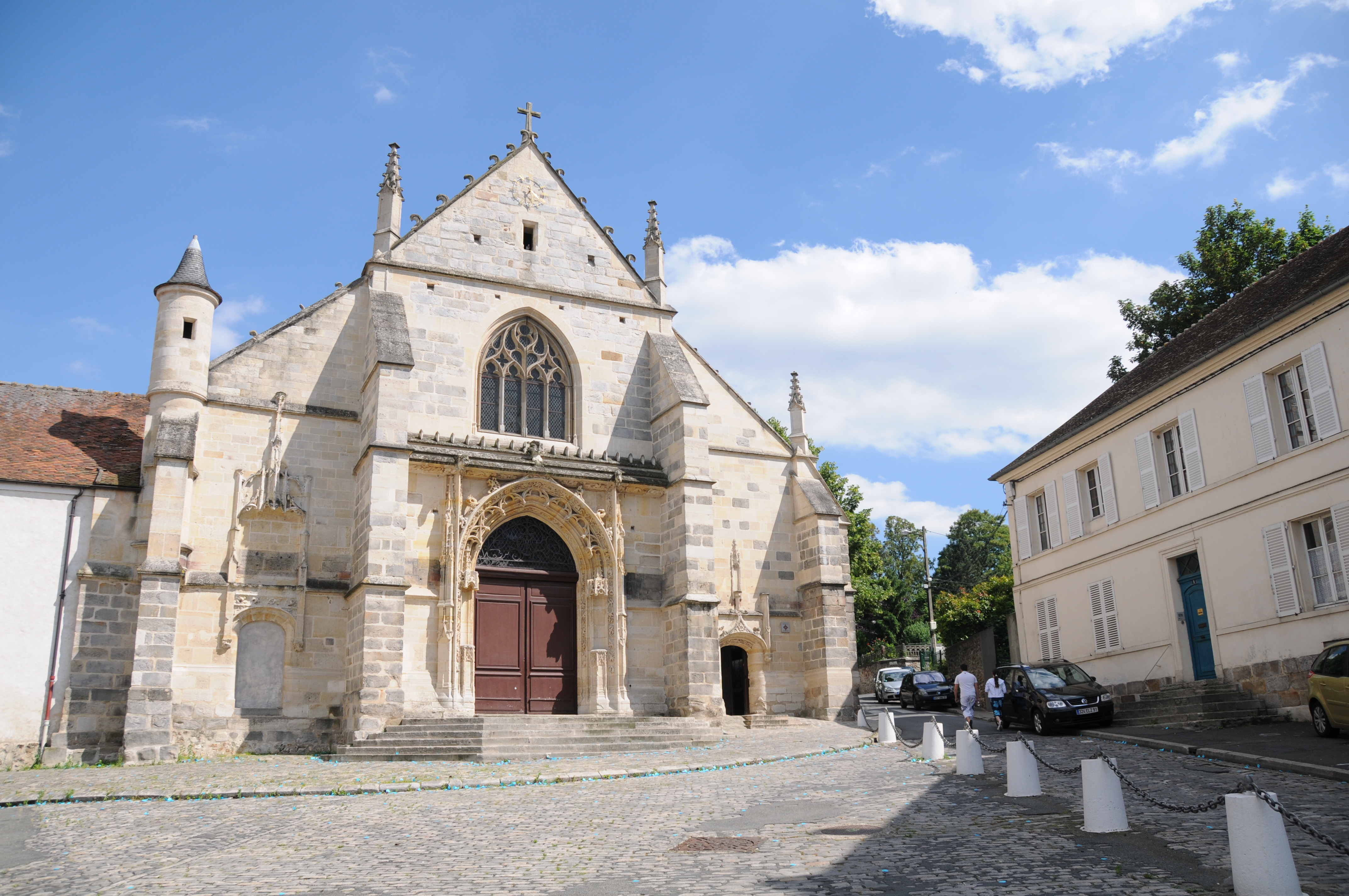 Longjumeau